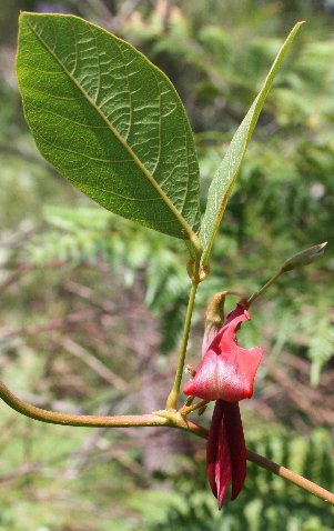 Kennedia rubicunda - Nannygoat Hill, Sydney